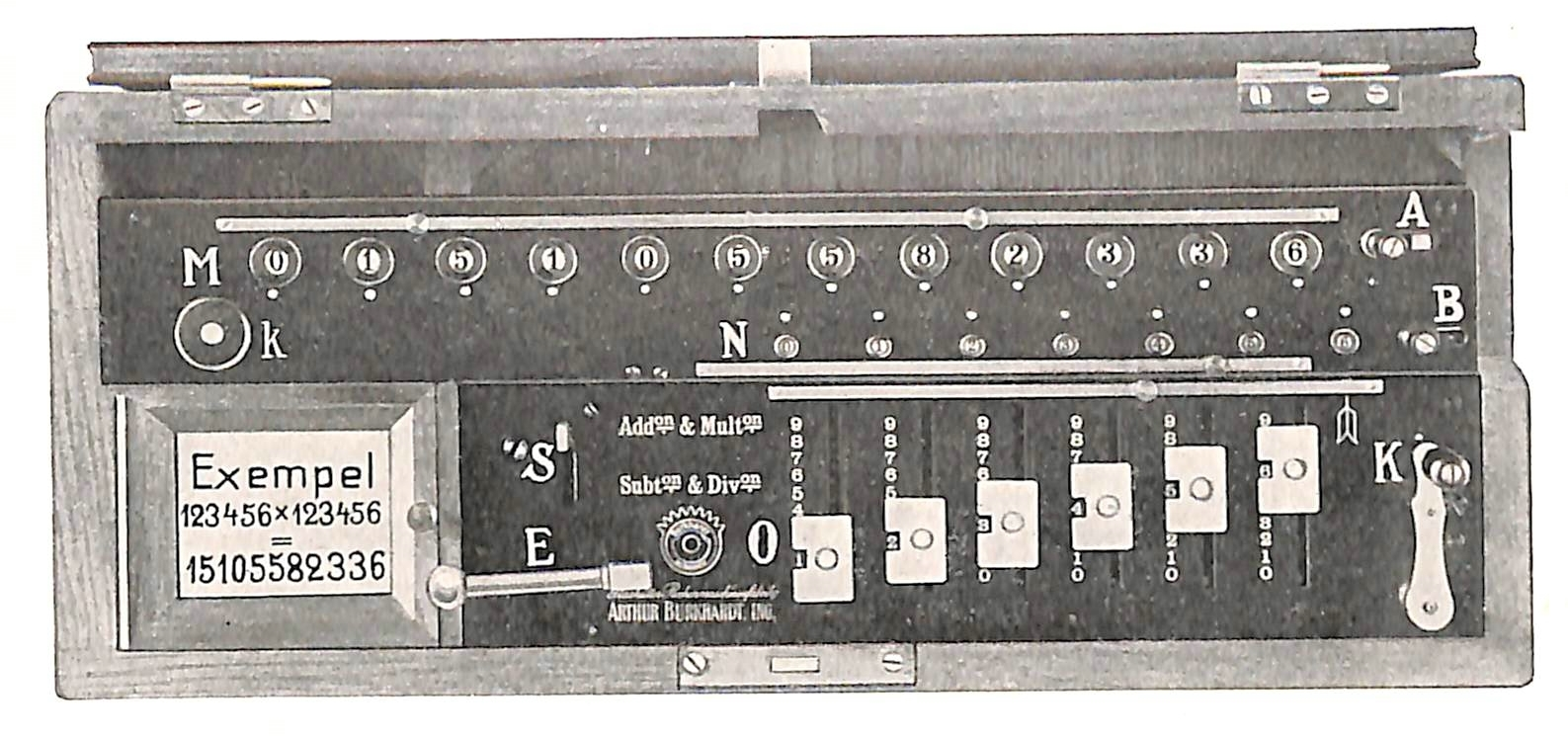 Ansicht einer serienmäßig gefertigten Rechenmaschine des Ingenieurs Arthur Burkhardt aus Glashütte (Sachsen). Die Fabrikation wurde 1878 in Glashütte begründet, Burkhardt vertrieb seine mechanische Rechenmaschine unter dem Handelsnamen BURKHARDT-ARITHMOMETER. Dieser Typ wurde auch auf der Weltausstellung in Chicago 1893 hoch prämiert.